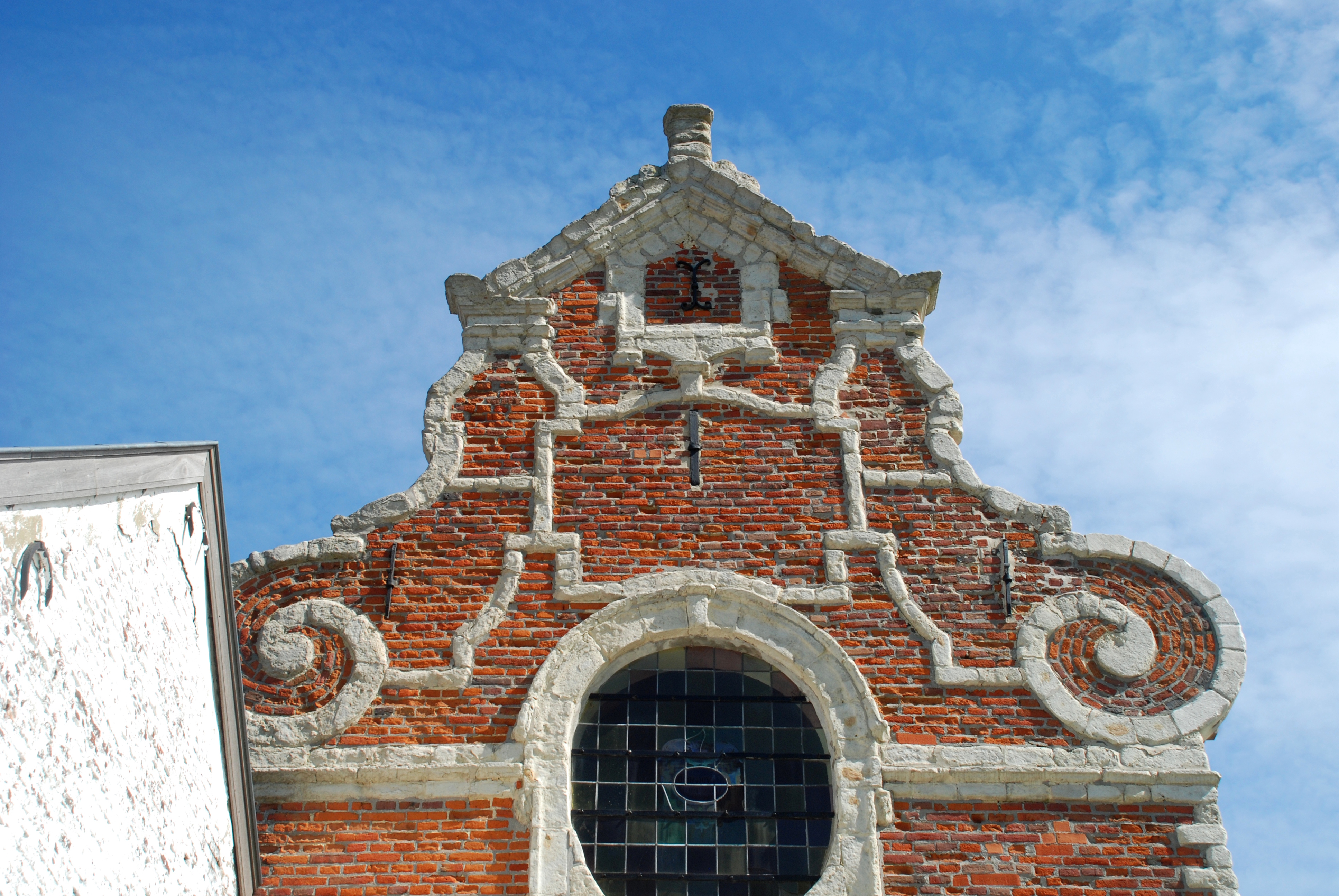 Belgique - Brabant wallon - Genappe - Chapelle du Chantelet